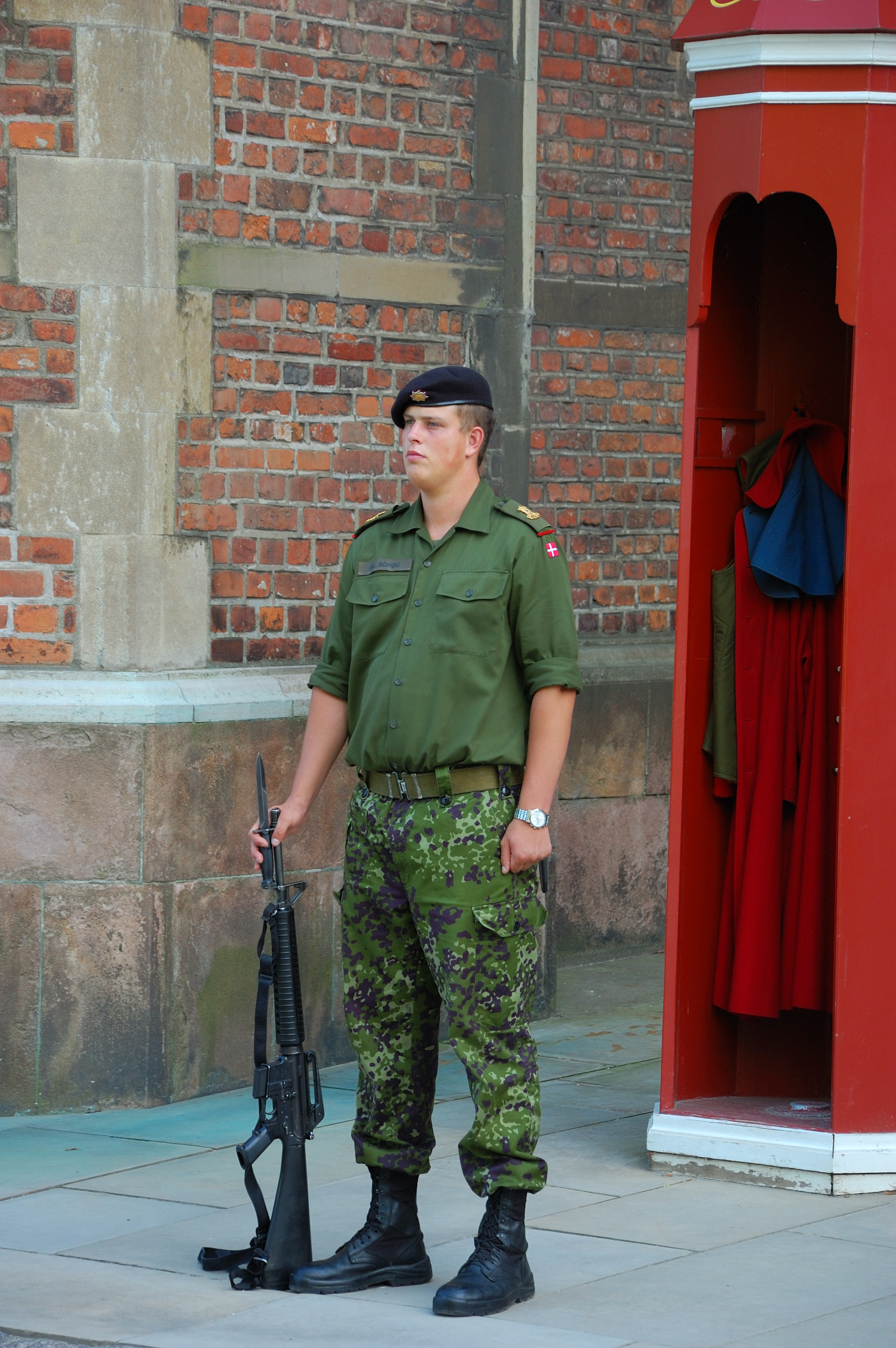 Vakt vid Rosenborgs slott, Köpenhamn.